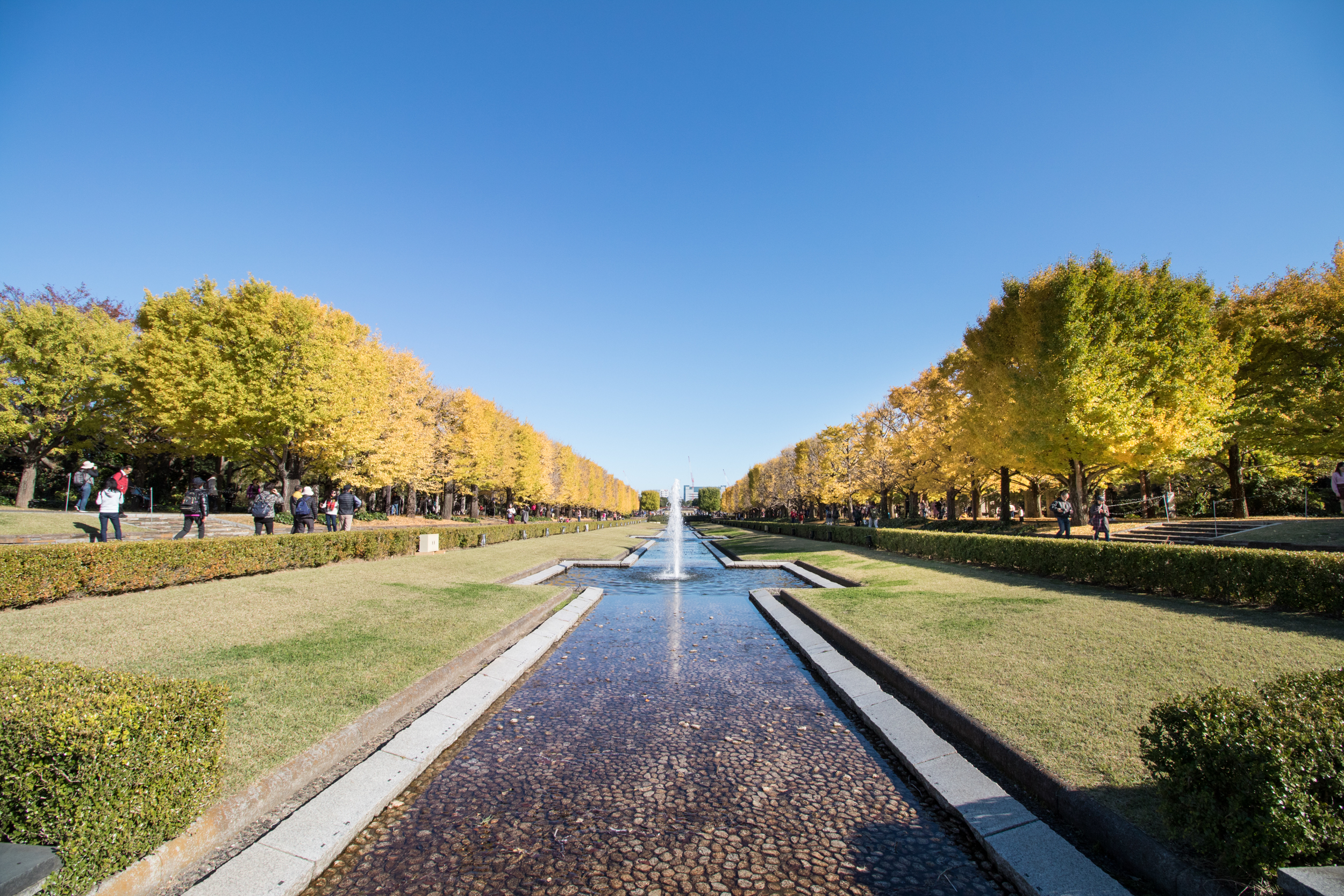 昭和記念公園イチョウ並木